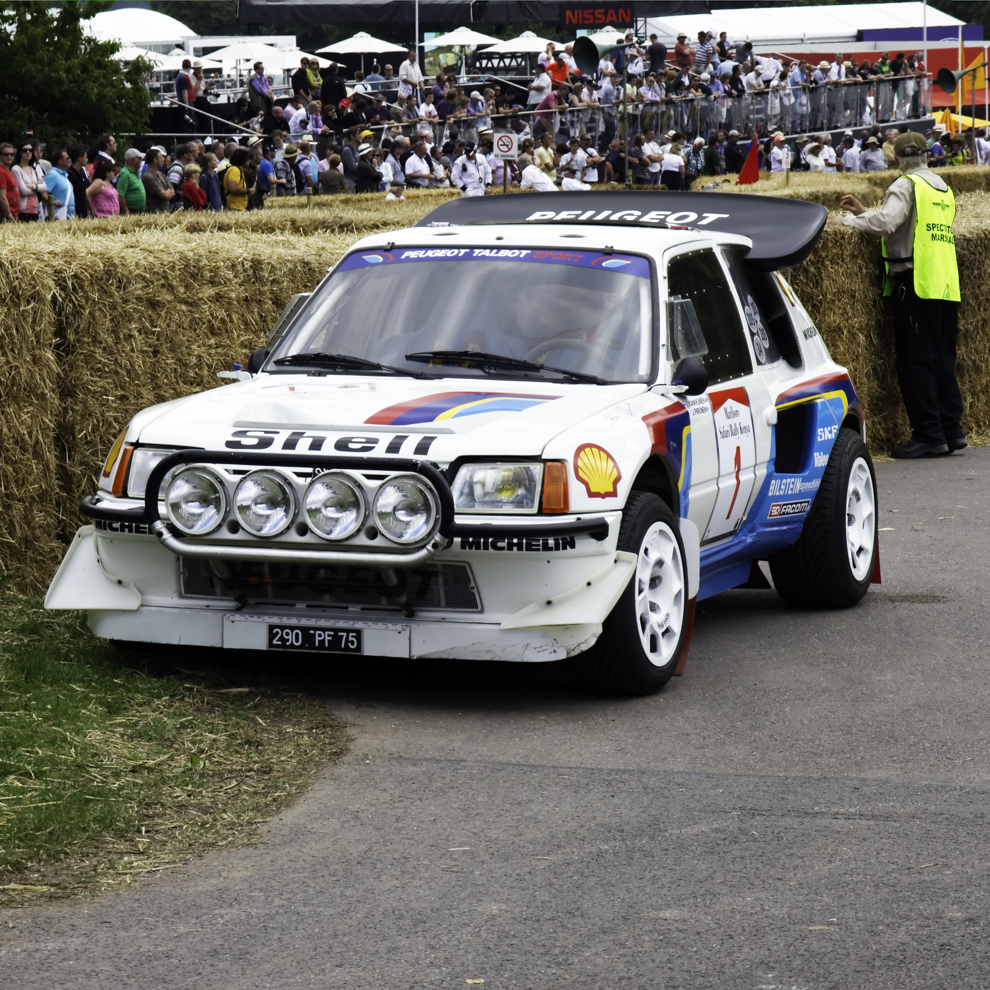 Peugeot 205 T-16